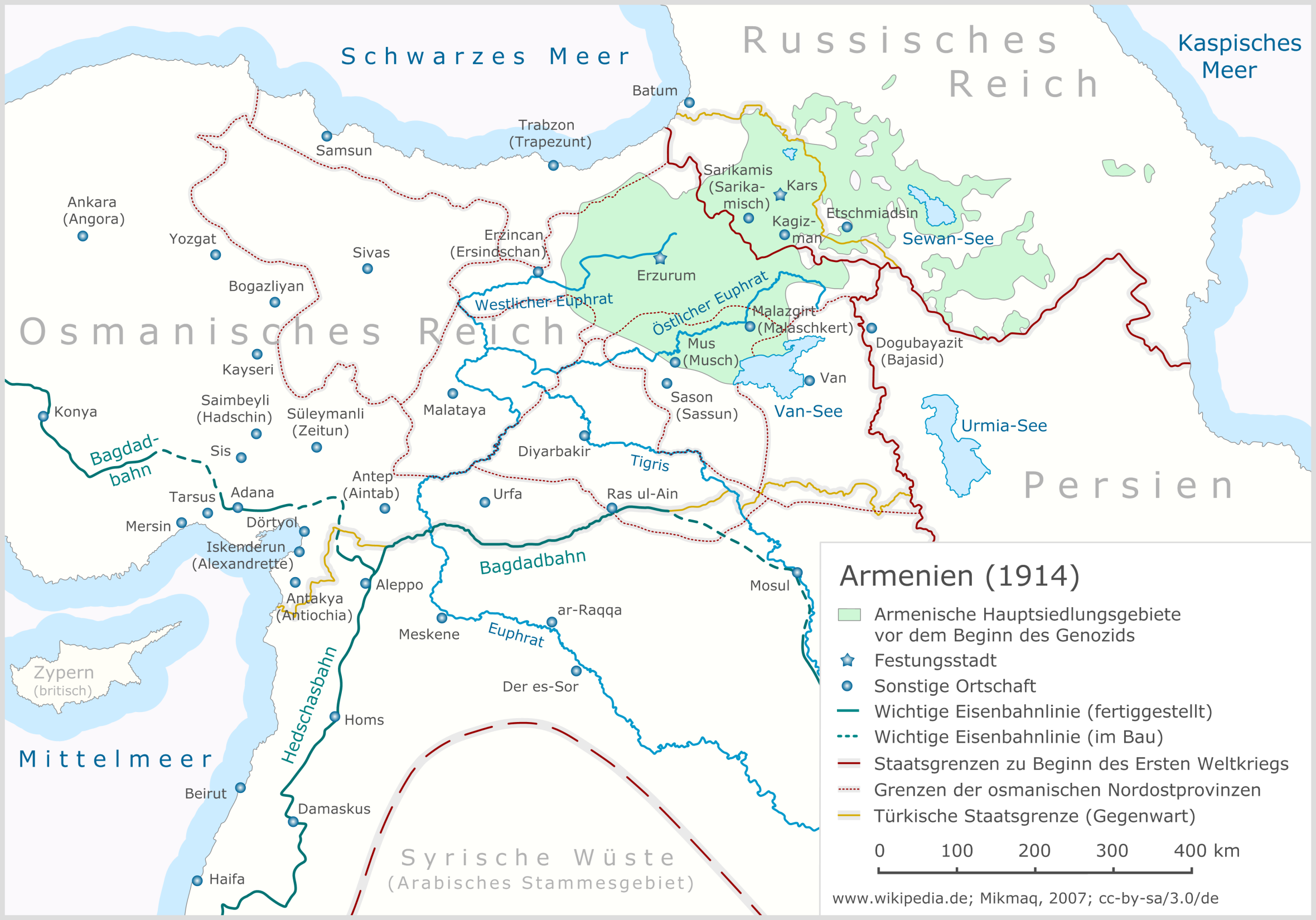 Armenien vor dem Genozid (1914), Version 1.0